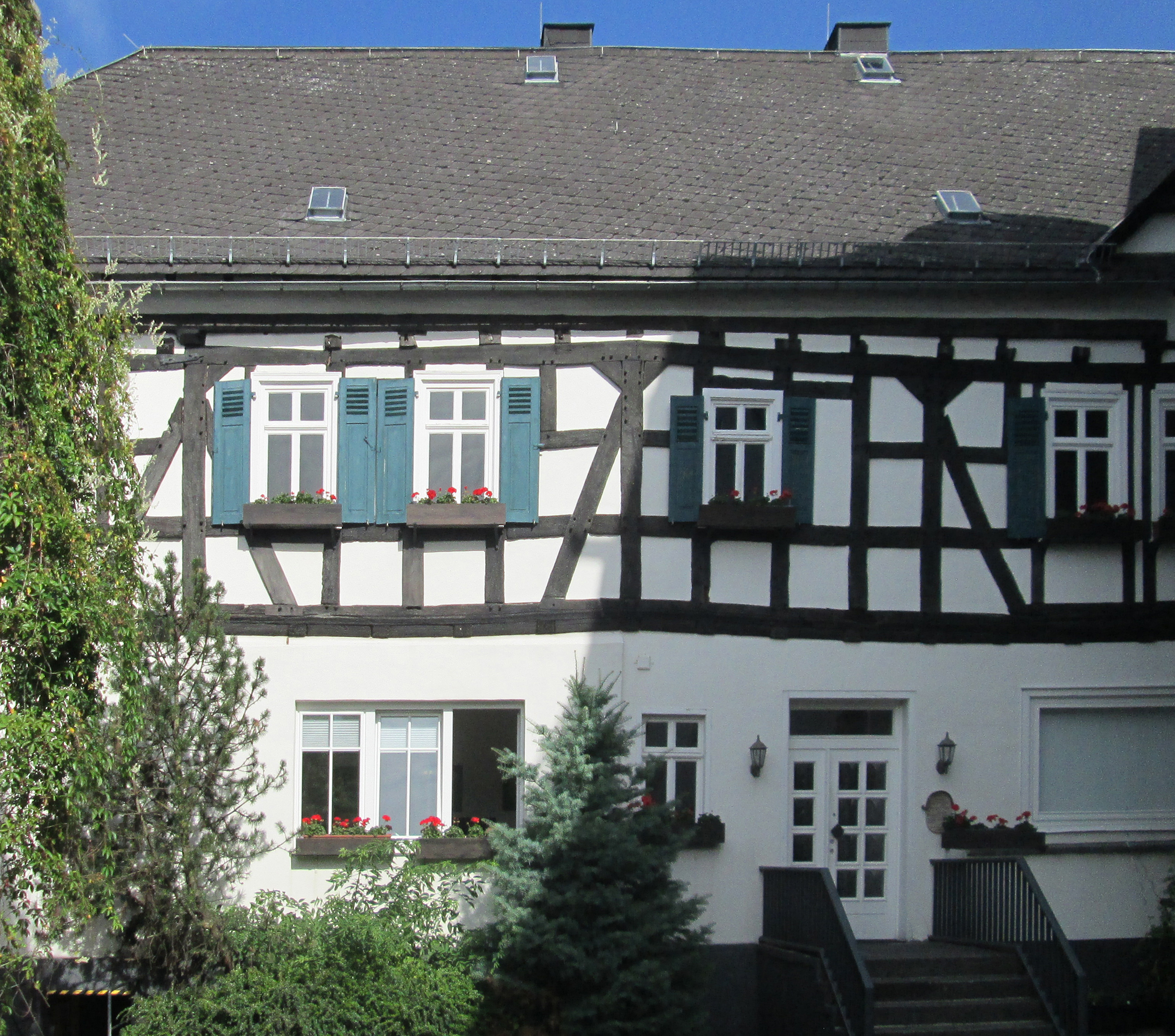 Abbildung zu Albertine von Grün